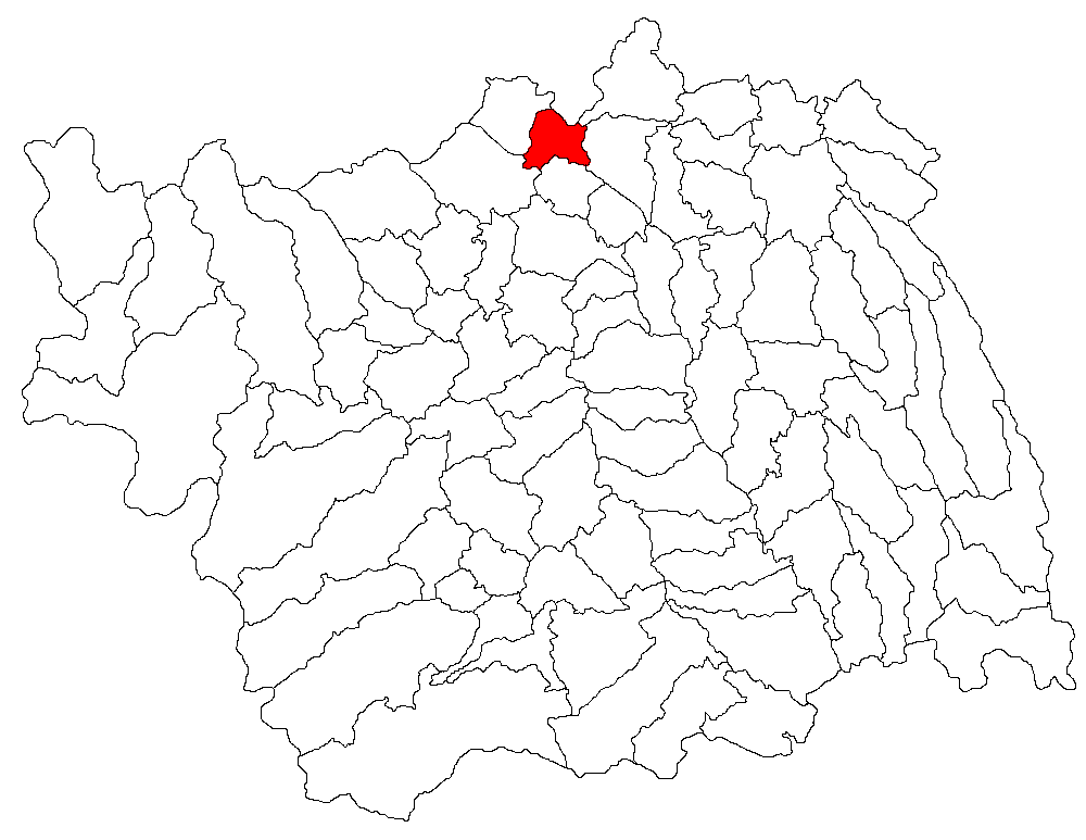 Categorie:Hărţi ale judeţului Bacău